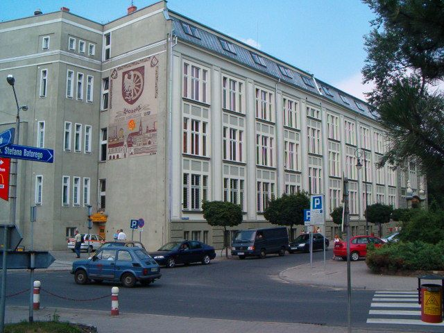 Urząd Miasta Racibórz, dawniej fabryka czekolady